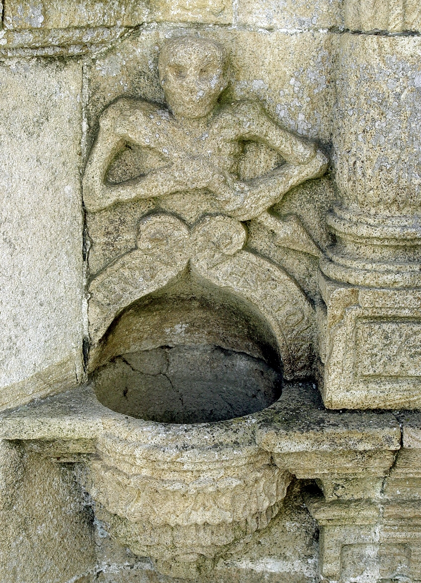 La Roche-Maurice (Bretagne, Finistère) Eglise Saint-Yves, Weihwasserbecken mit Tod: "Ich kriege euch alle"